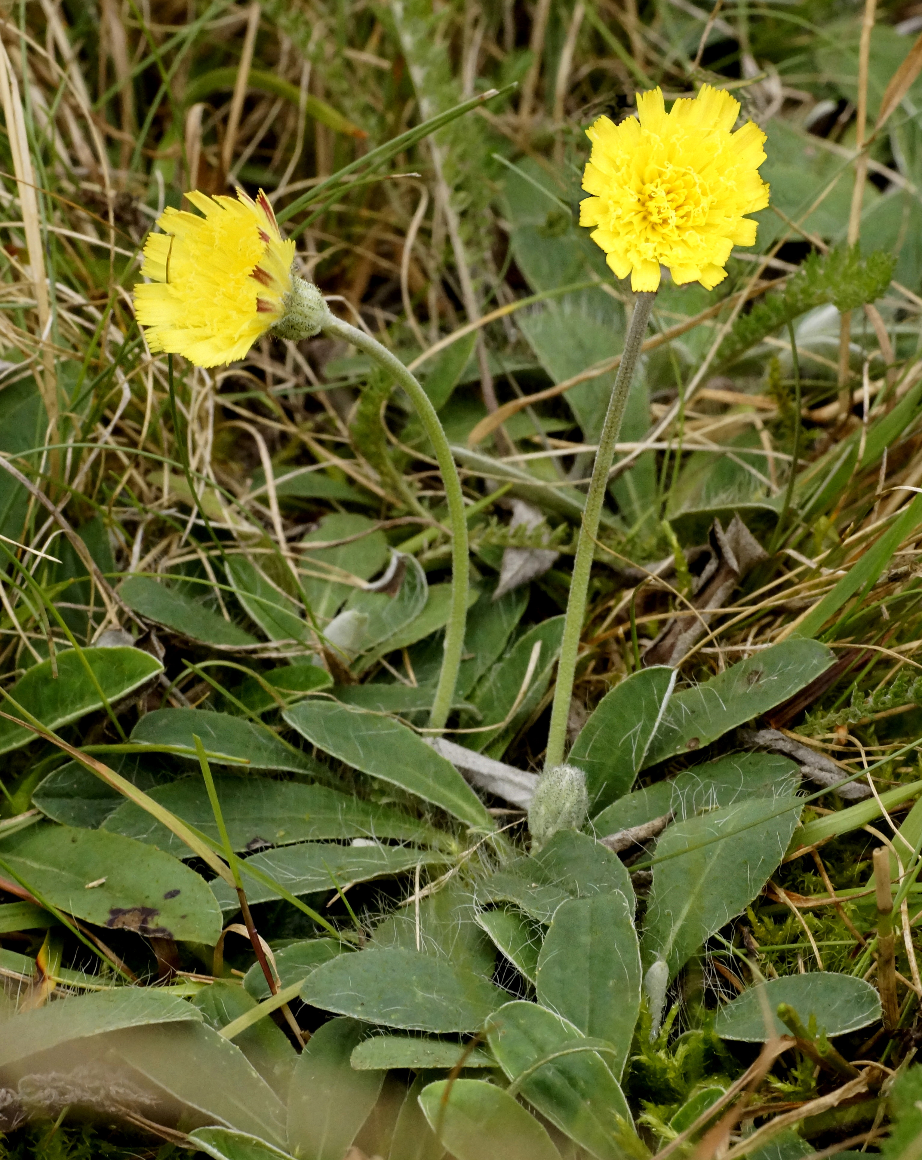 Langhaariges Habichtskraut, Asteraceae, Deutschland, Bayern, Oberfranken, Selbitz Photo: U.Schmidt, VIII.2012